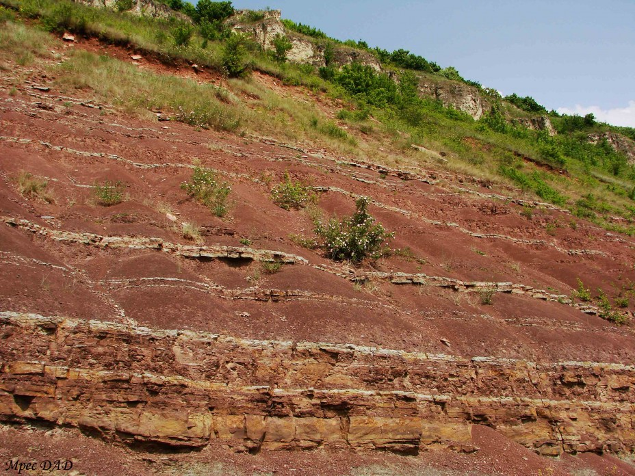 Відслонення Дністровського каньйону.: Відслонення гірських порід на схилах Дністровського каньйону, річка Дністер, Україна.